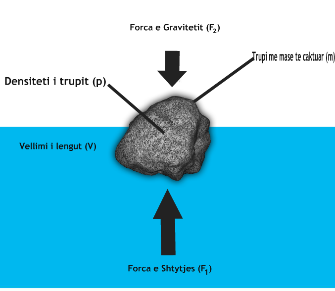 Këtu eshte paraqitur forca e arkimedit